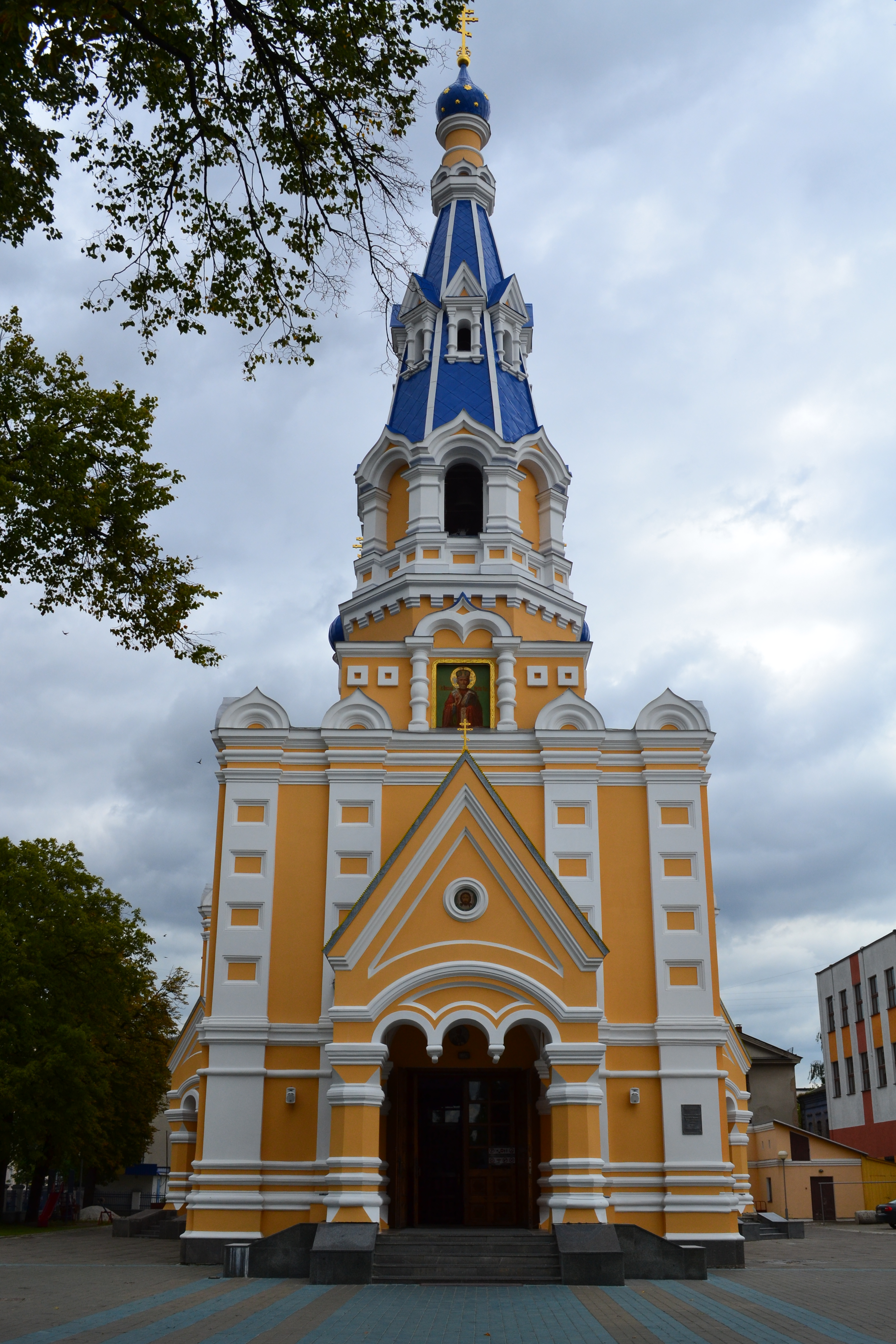 Беларуская (тарашкевіца): Сьвята-Мікалаеўская брацкая царква. г. Берасьце This is a photo of Belarusian heritage monument. Reference number: 113Г000021 ( WLM)